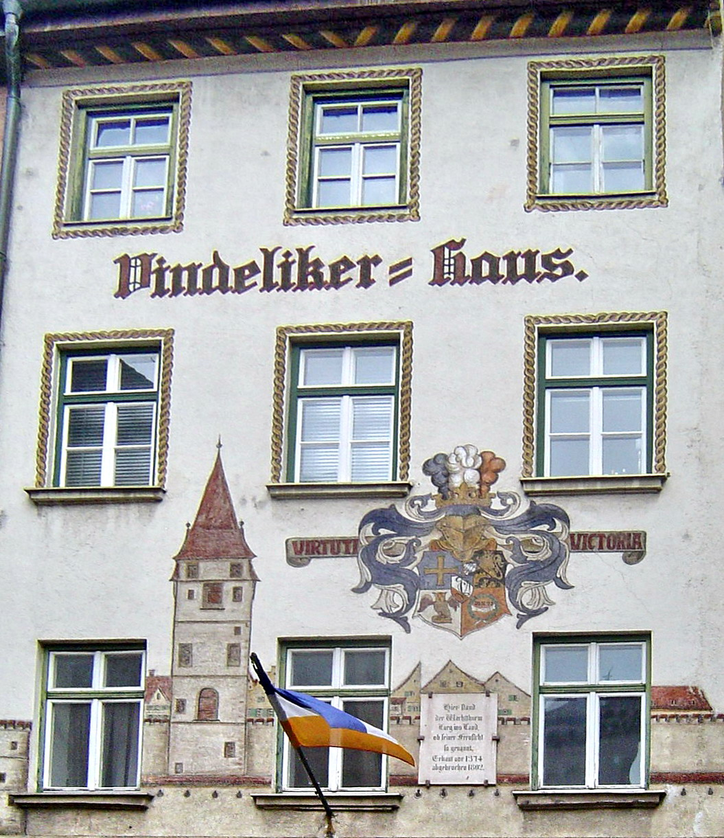 München, Marienstraße 21, Vindeliker/Vindelicia-Haus (Wohn- und Korporationshaus) mit Fassadenmalerei des Isartors und Teilen der ehem. Stadtmauer sowie des Wachturmes "Lueg ins Land".